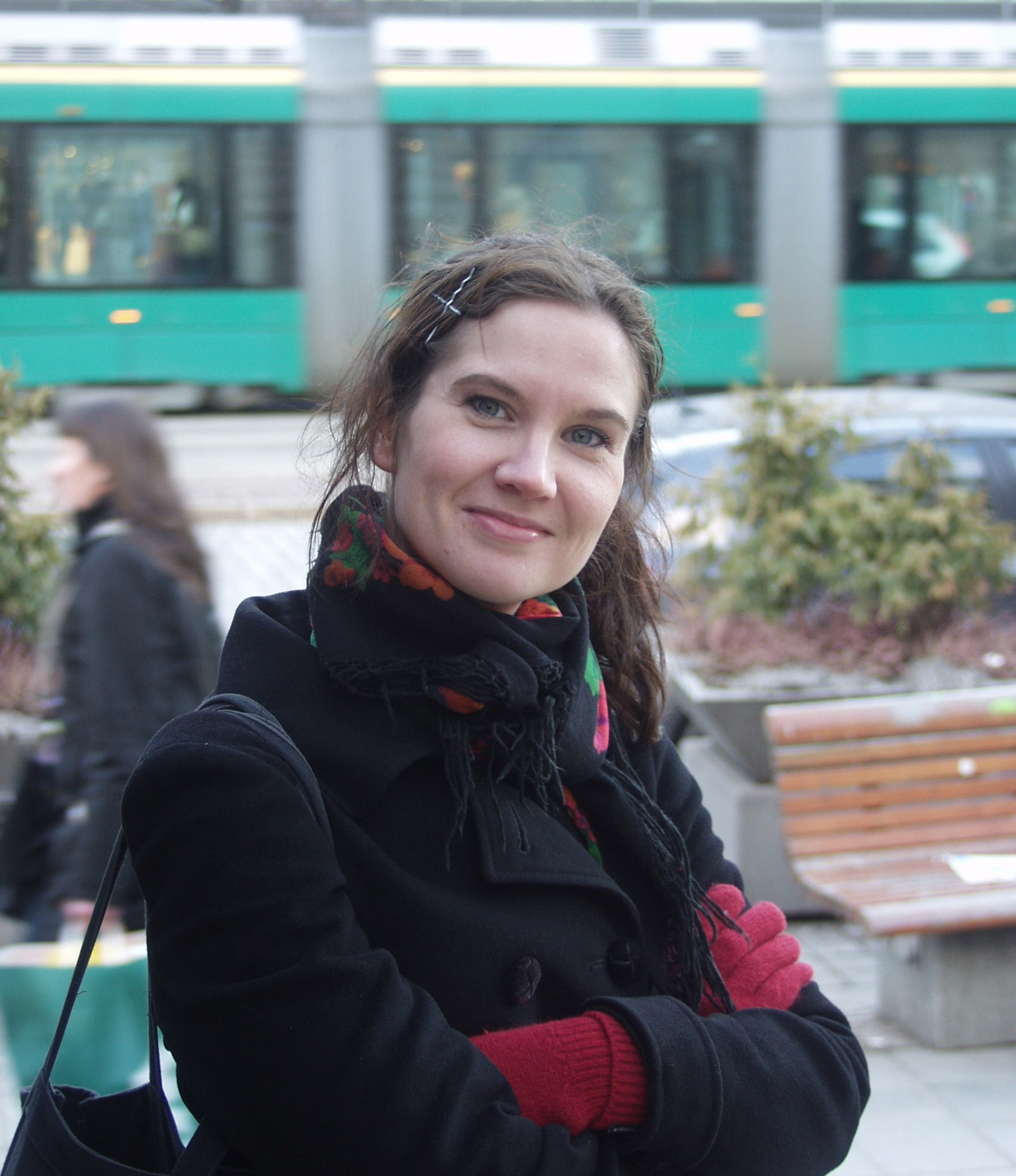 Johanna Sumuvuori Vihreiden vaalimökillä Kolmen sepän patsaalla huhtikuussa 2011